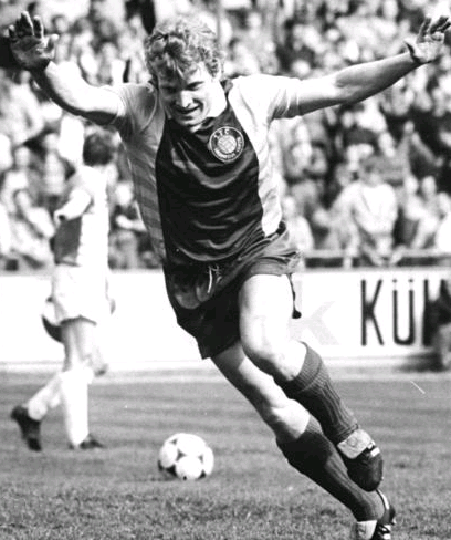 Title: FDGB-Pokal, FCK - 1. FC Lok Leipzig 1:3 Factual corrections and alternative descriptions are encouraged separately from the original description. Additionally errors can be reported at this page to inform the Bundesarchiv. Original historic description: ADN-ZB-Thieme -19.5.87-kb- Karl-Marx-Stadt: FDGB-Pokal- Halbfinale- FCK - 1. FC Lok Leipzig 1:3 (0:2)- Cup-Verteidiger 1. FC Lok Leipzig qualifizierte sich als erste Mannschaft für das Finale um den FDGB-Fußballpokal, das am 13.6. im Berliner Stadion der Weltjugend ausgetragen wird. Hans-Jörg Leitzke freut sich über das zweite Tor für seine Leipziger Lok, das in der 29. Minute von ihm erzielt wurde. FCK-Torwart Holger Hiemann hat das Nachsehen.